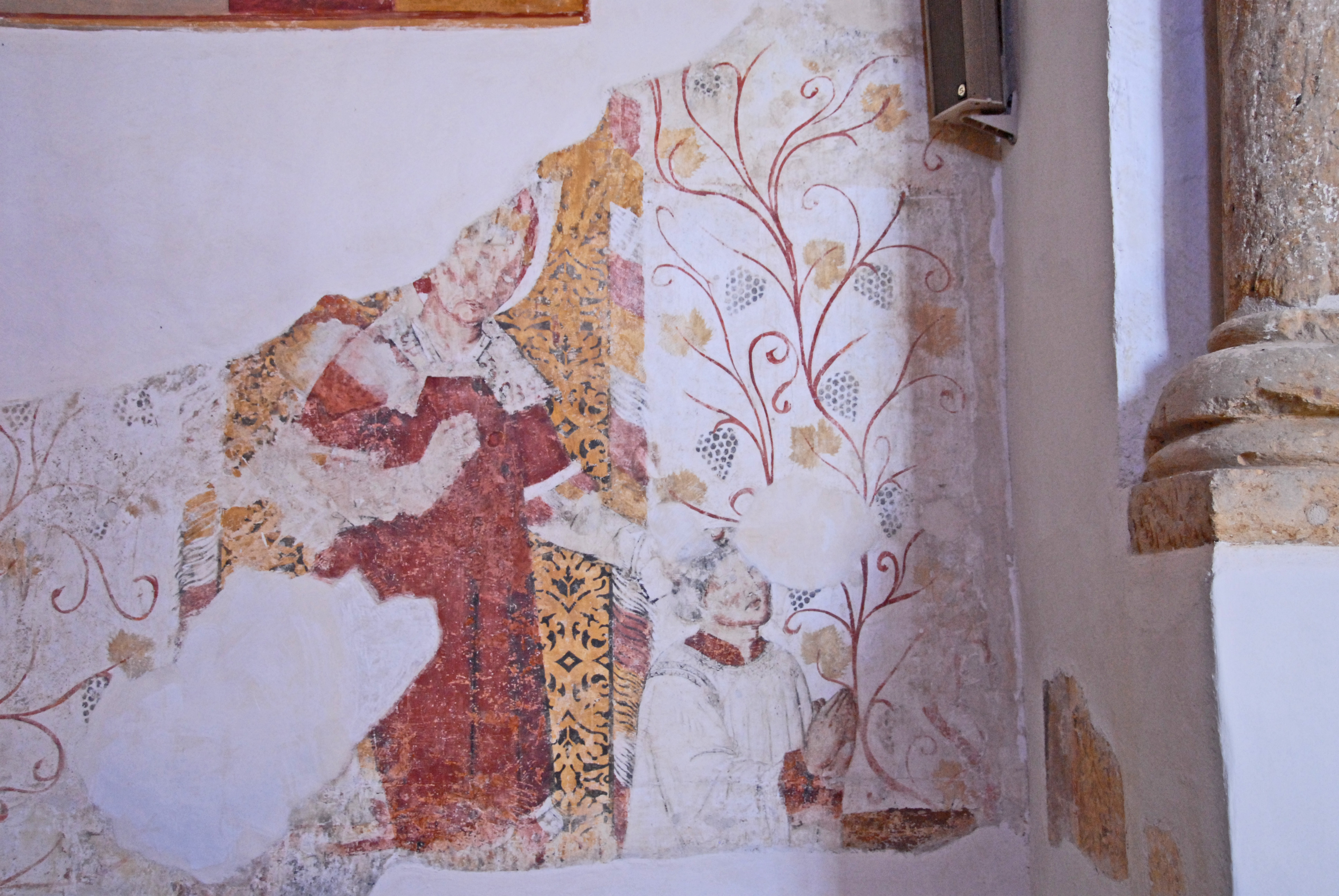 Sts-Pierre-et-Paul de Montceaux-l'Étoile, Frasko im Schiff